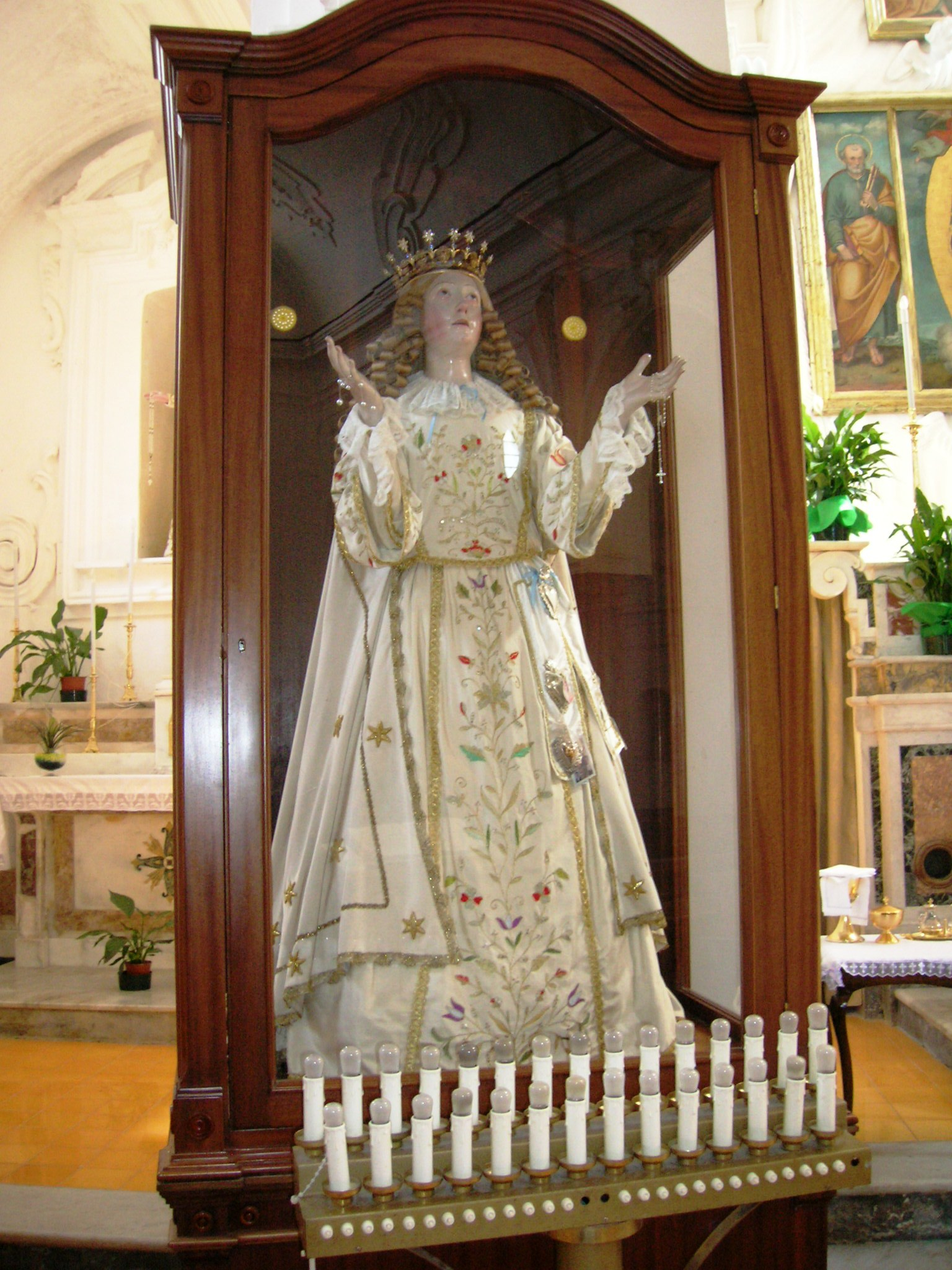 Chiesa di Santa Maria dell'Assunta a Gragnano